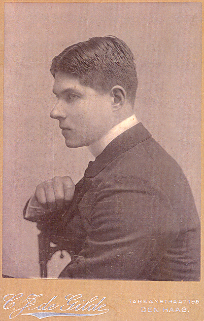 Henri van Booven